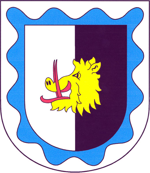 Znak obce Horní Habartice